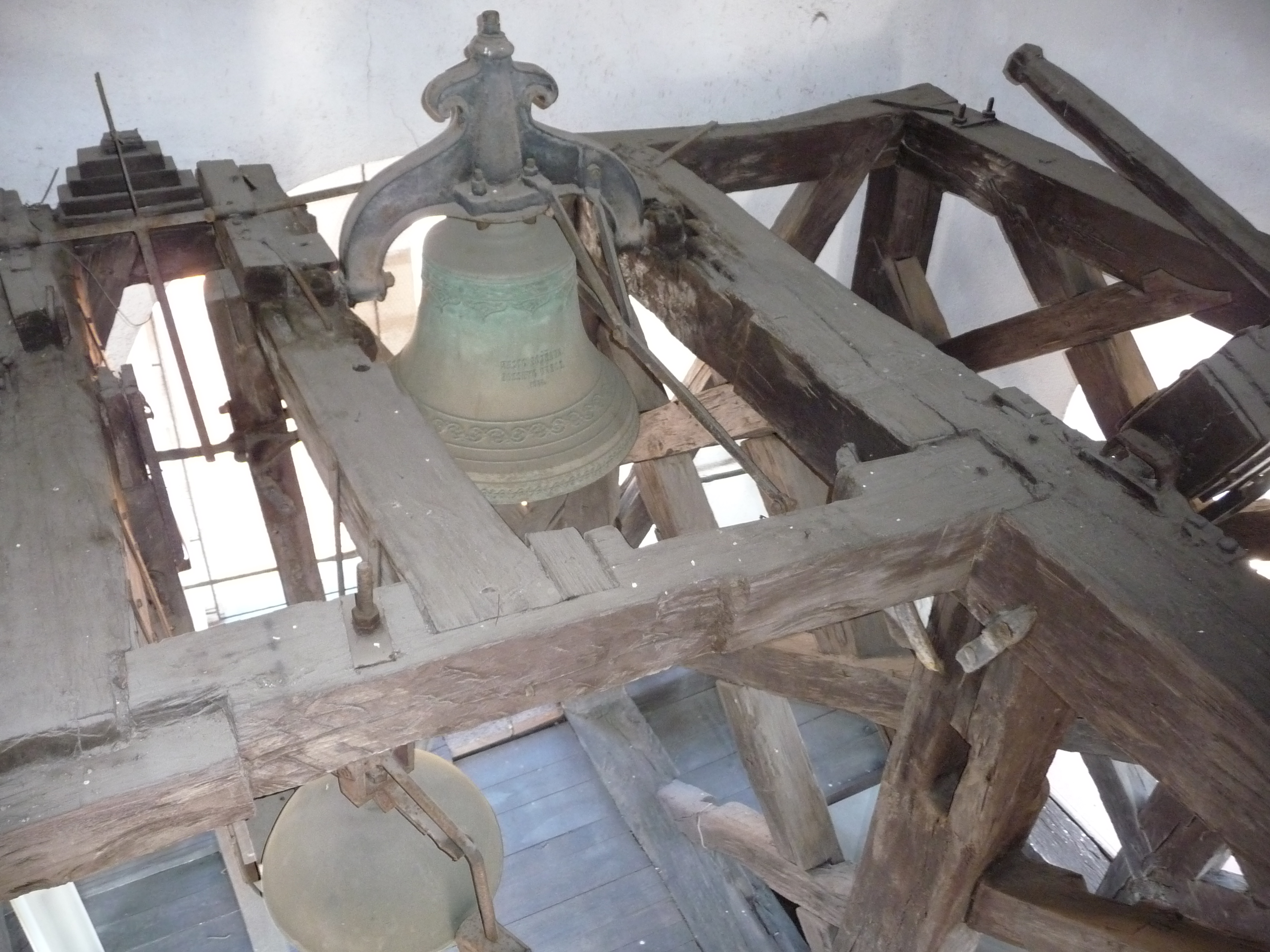 jediný zvon vo vež